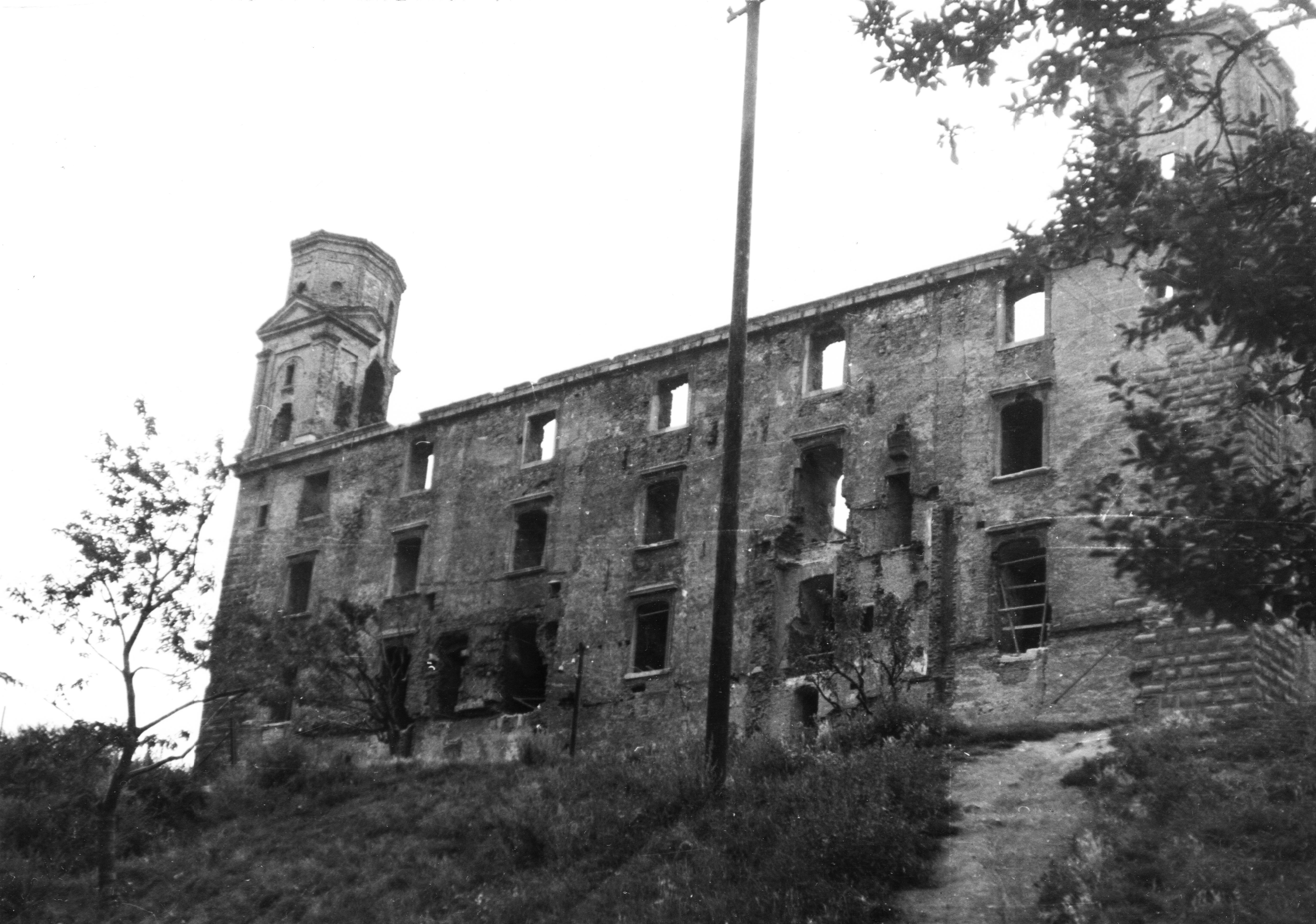 a vár keleti oldala. Location: Slovakia, Bratislava Tags: castle ruins, Czechoslovakia Title: a vár keleti oldala.